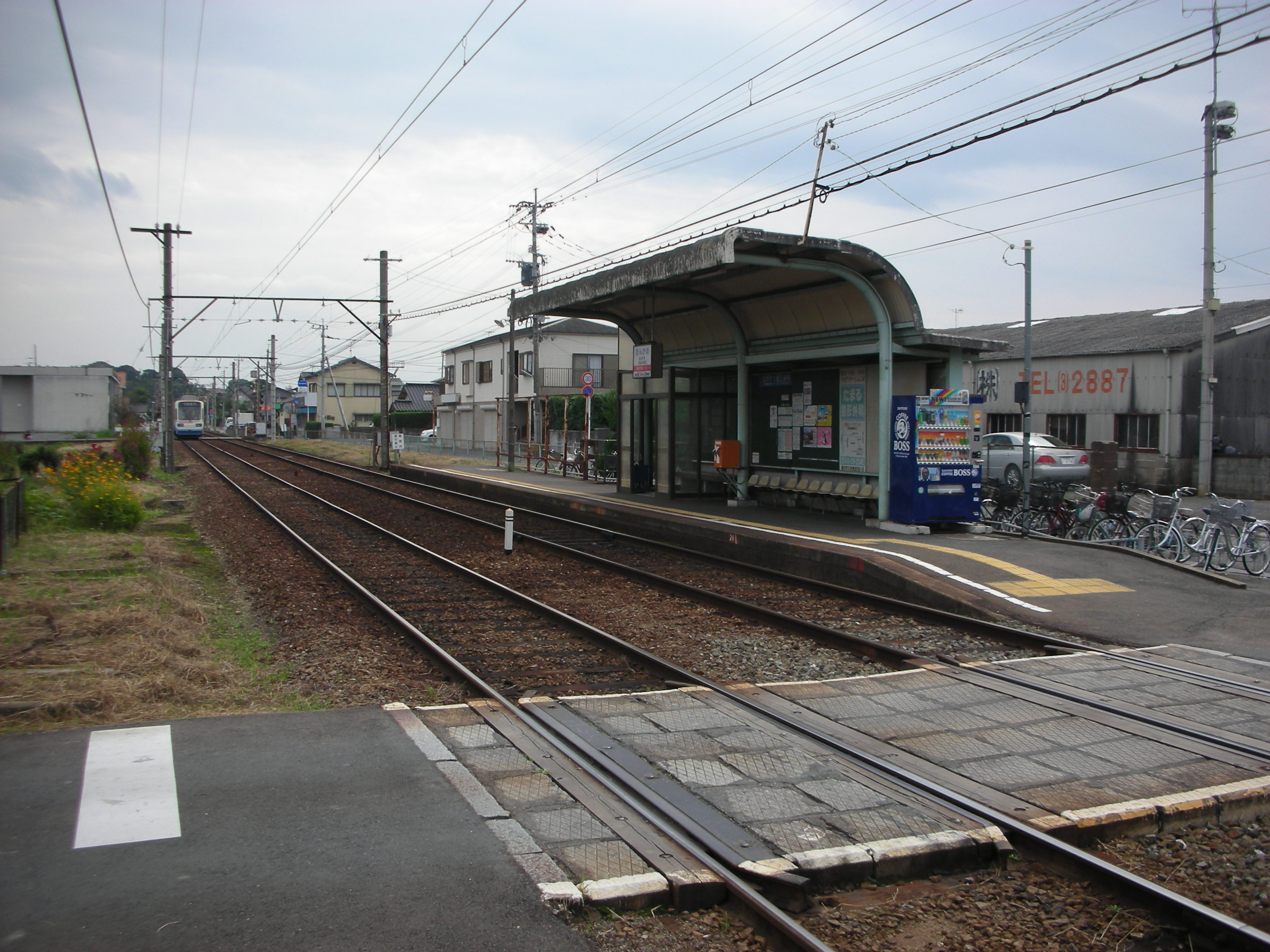 2008/10/10におんさき自身が撮影。遠賀野駅（黒崎方面のホーム）